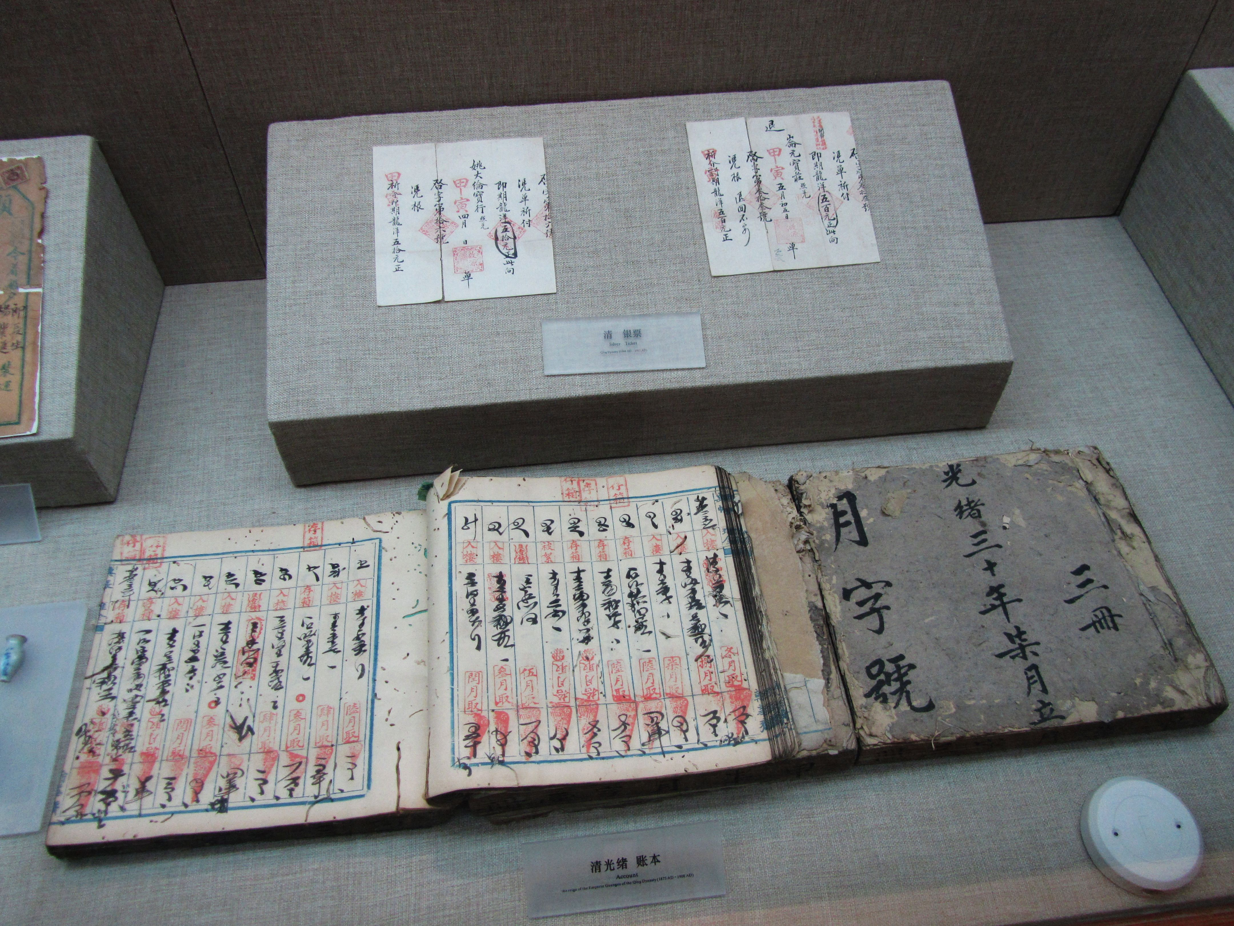 清代银票与光绪年间的账本，屯溪博物馆藏。